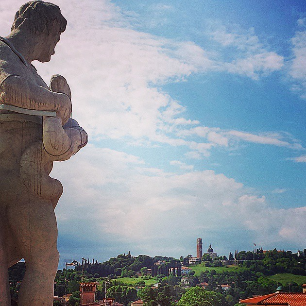 Basilica di Monte Berico This is a photo of a monument which is part of cultural heritage of Italy.